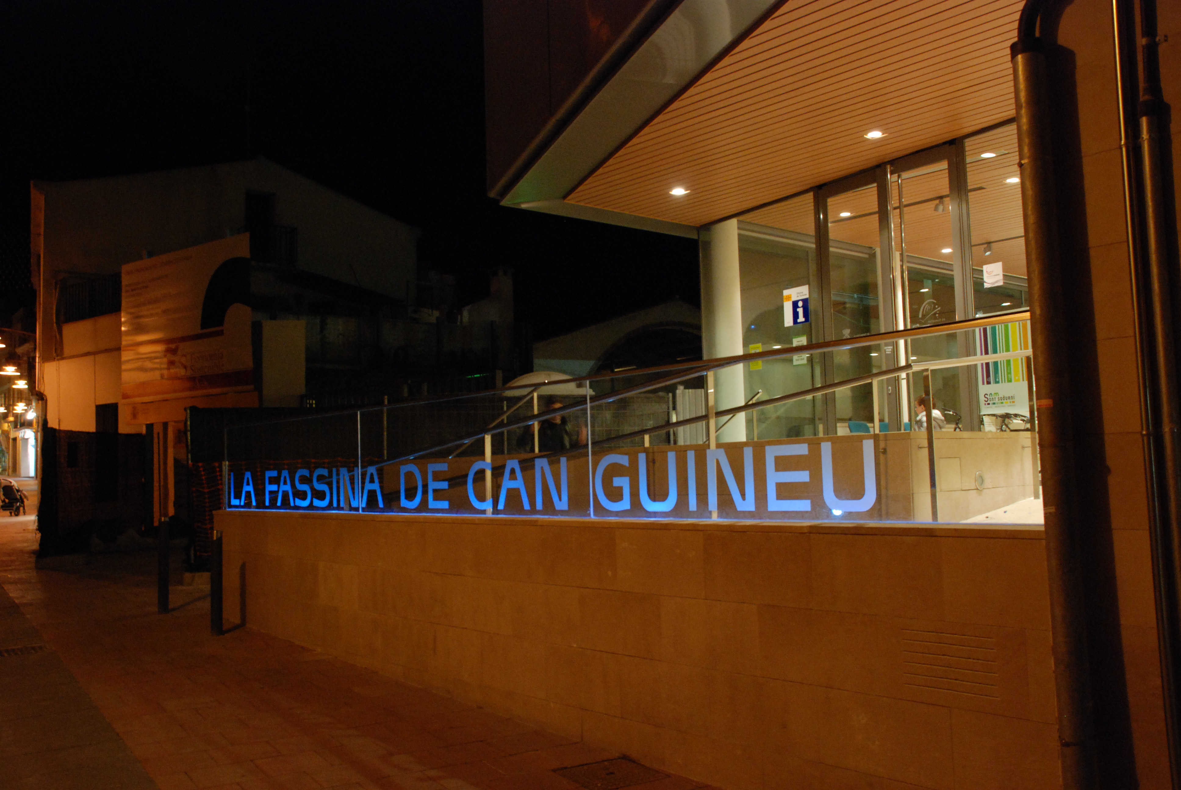 Entrada a l'Oficia de Turísme. També és l'entrada al futur Centre d'Intrpretació del Cava.